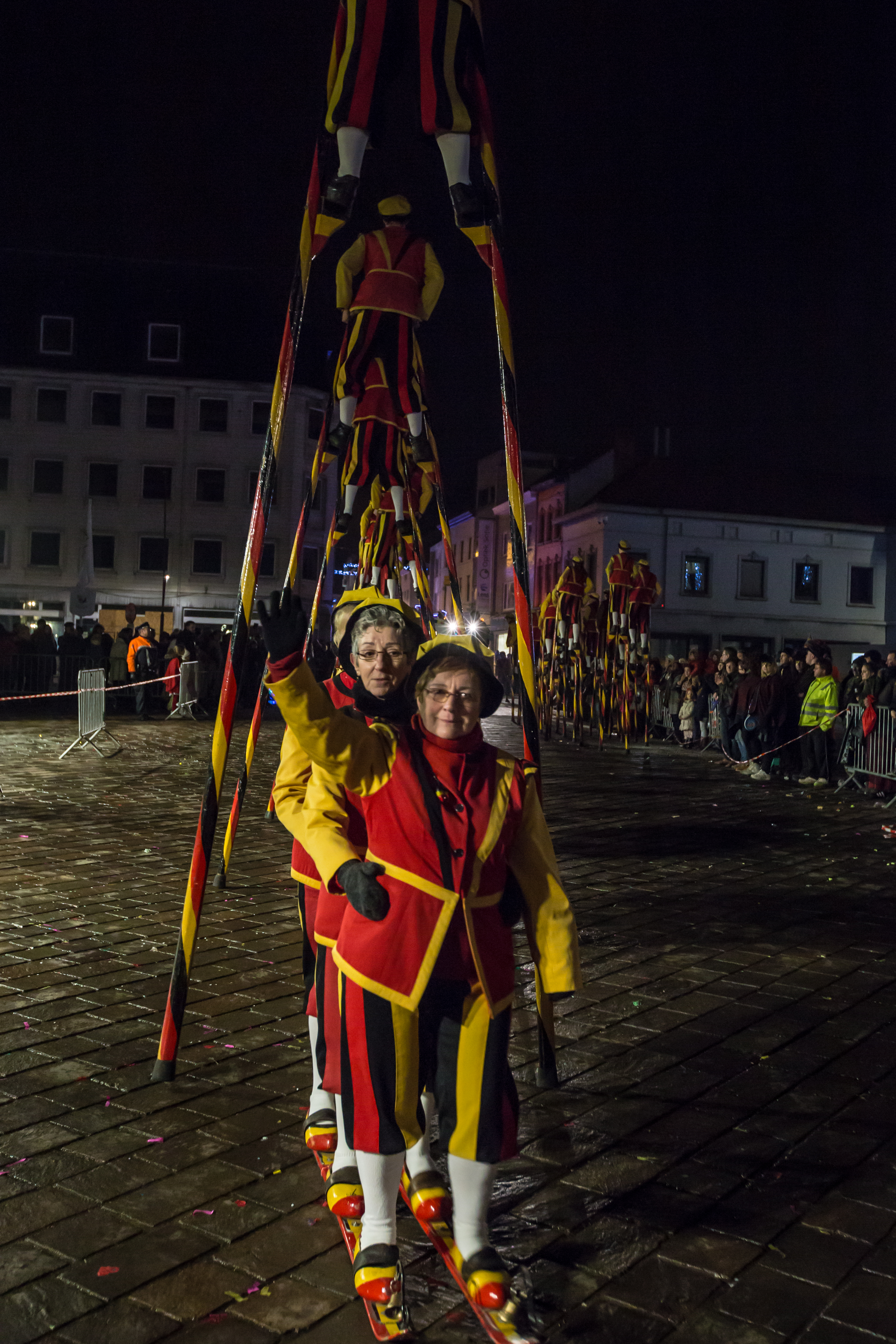 De Koninklijke Steltenlopers van Merchtem tijdens de Bommelstoet in Ronse, 6 januari 2018